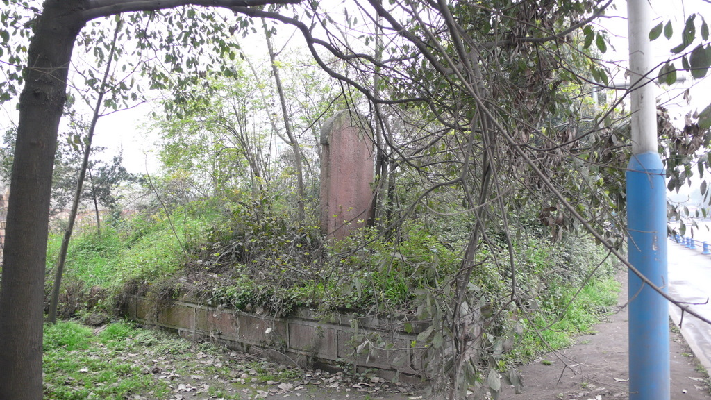 中文（台灣）: 高頤墓